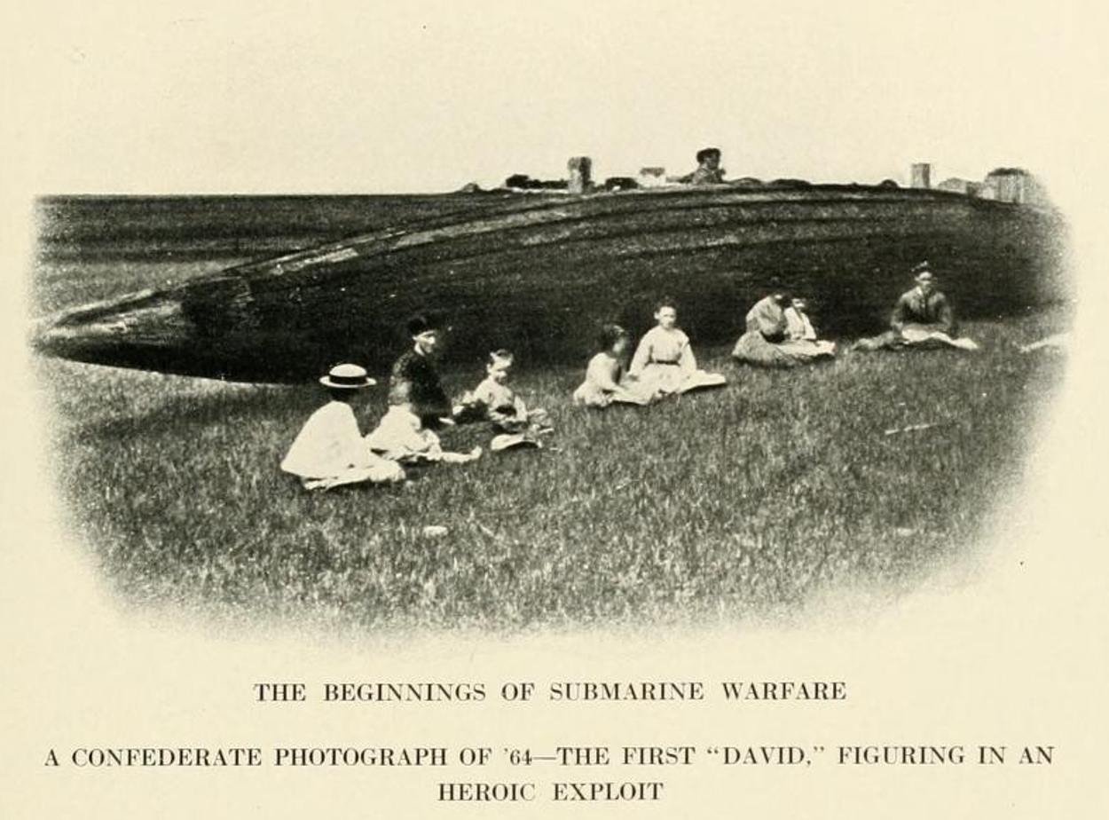 CSS David